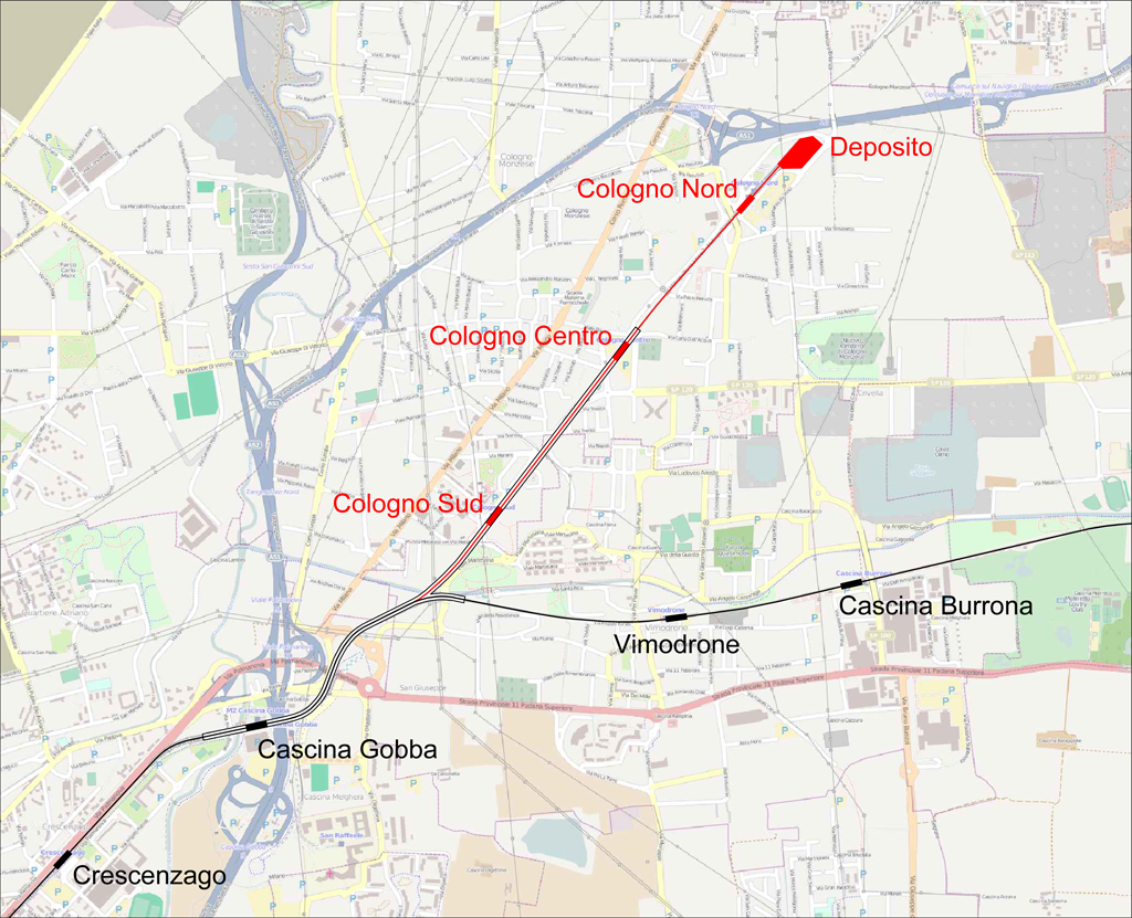 Mappa della tratta Cascina Gobba-Cologno Nord della linea 2 della metropolitana di Milano.